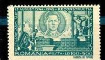 Почтовая марка 1945 года, посвящённая годовщине свержения фашистского режима